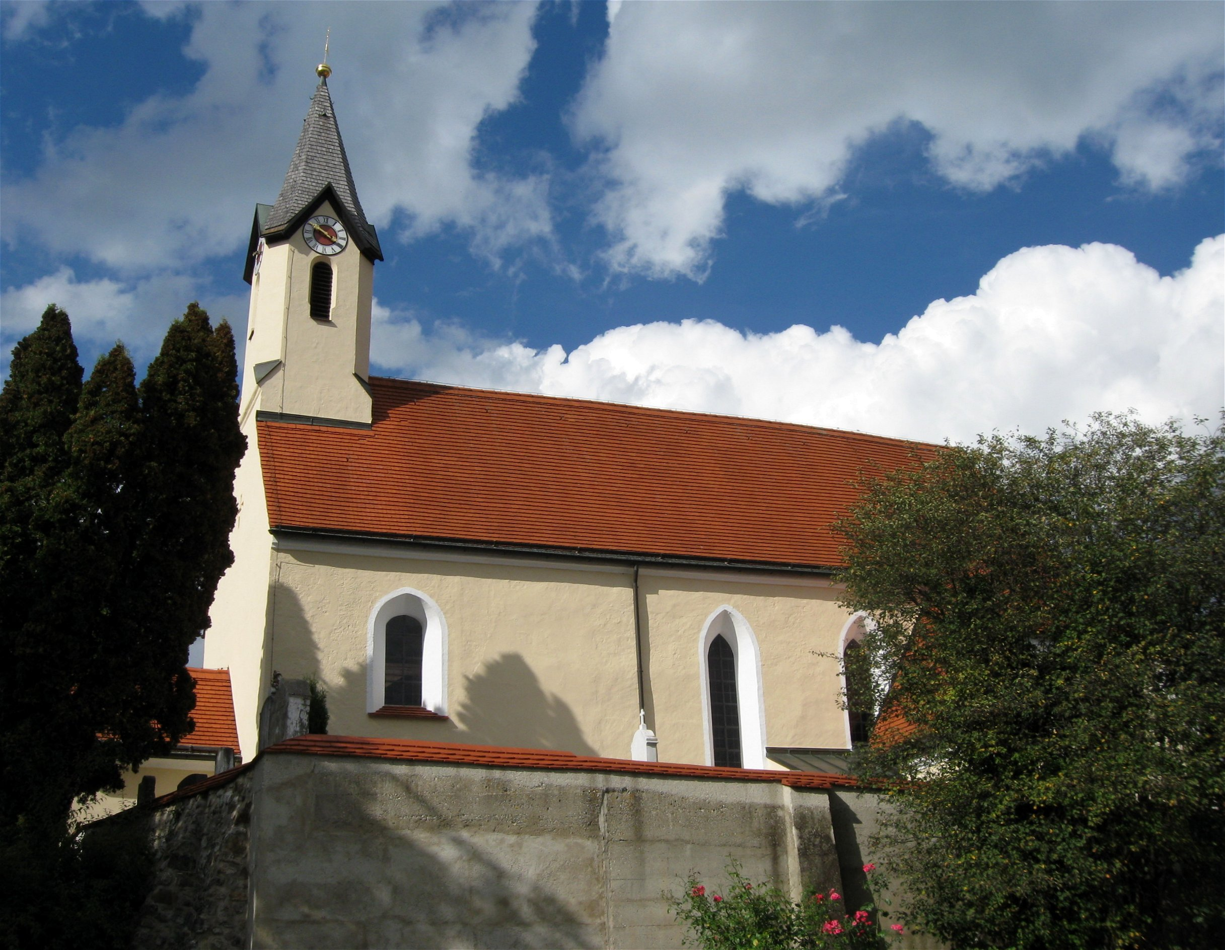 Kirchplatz 2, Reischenhart. Kath. Filialkirche St. Peter, Saalbau mit Satteldach,. westlichem Dachreiter, südlicher Sakristei mit Halbwalmdach, romanische Mauerwerksteile im Langhaus, spätgotischer Bau, barock ausgebaut, Sakristei um 1670, 1743 Umgestaltung und Anbau der westlichen Vorhalle, 1845/46 Turm; mit Ausstattung; Friedhofsummauerung, im Kern wohl noch spätmittelalterlich.